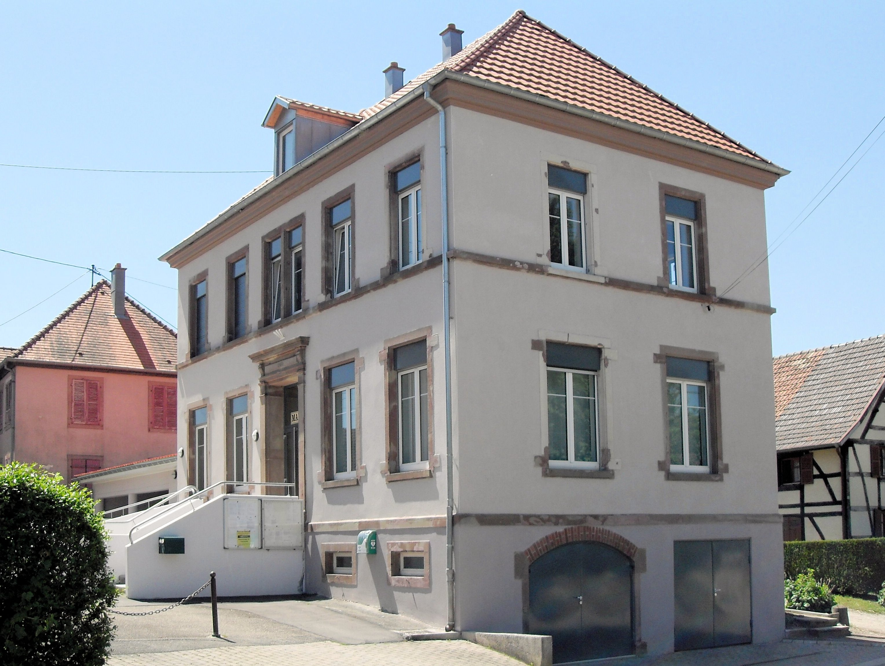 La mairie de Romagny